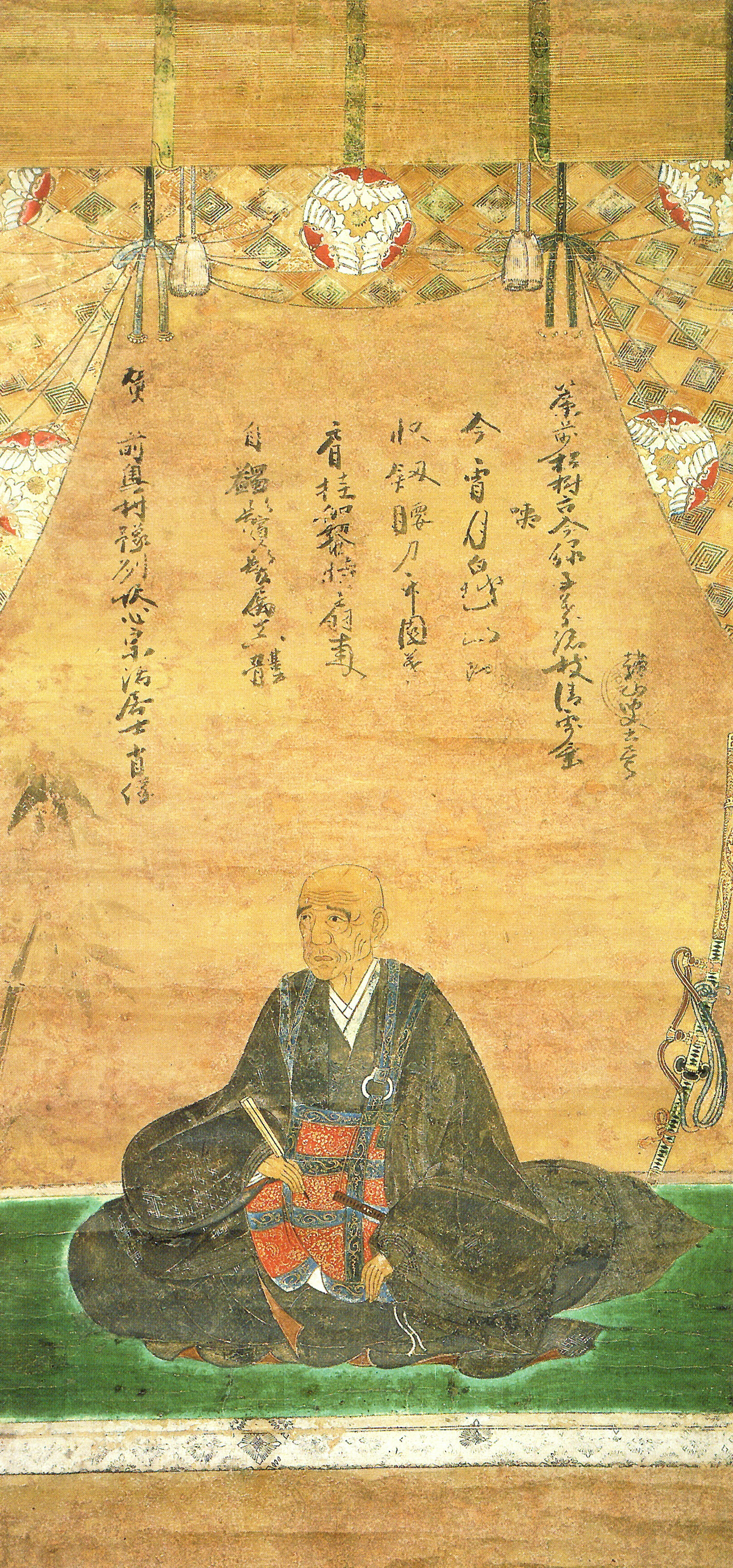 奥村永福の肖像。